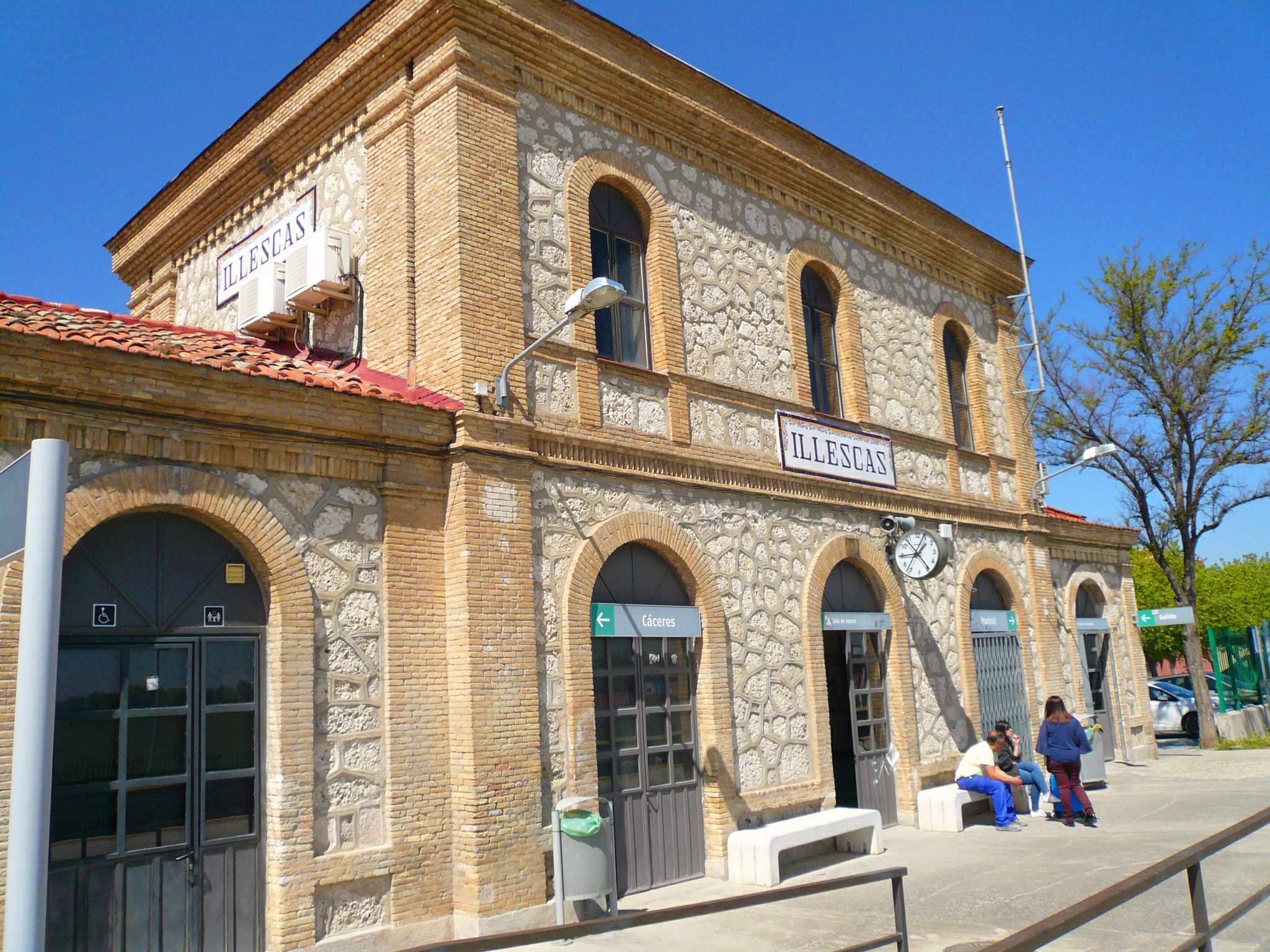 Estación de tren de Illescas (Toledo)